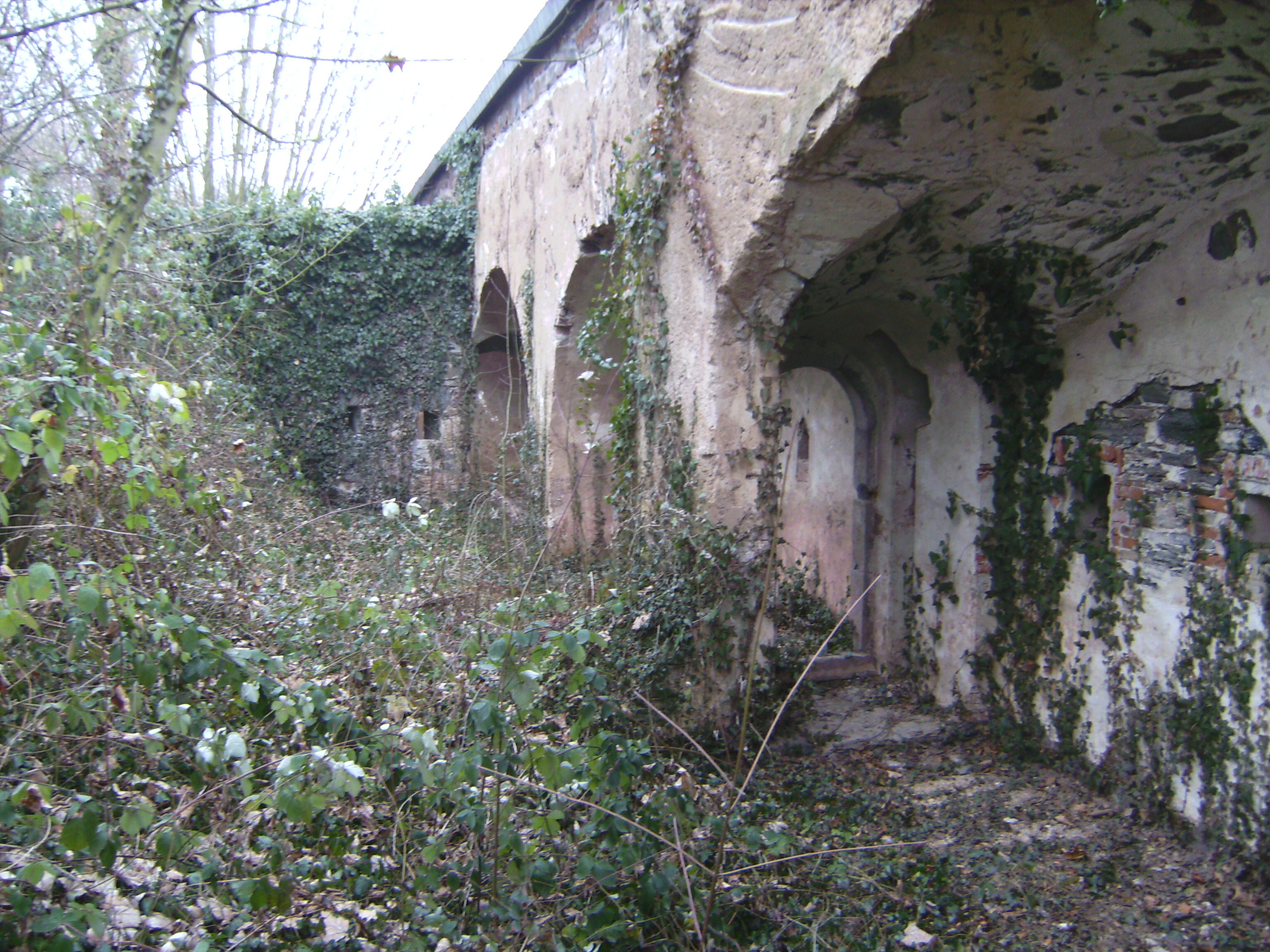 Moselflesche in Koblenz. Flusseitige Flankenmauer mit Durchgang im Stützbogen (Türe fehlt) und Grabenstreiche im Hintergrund